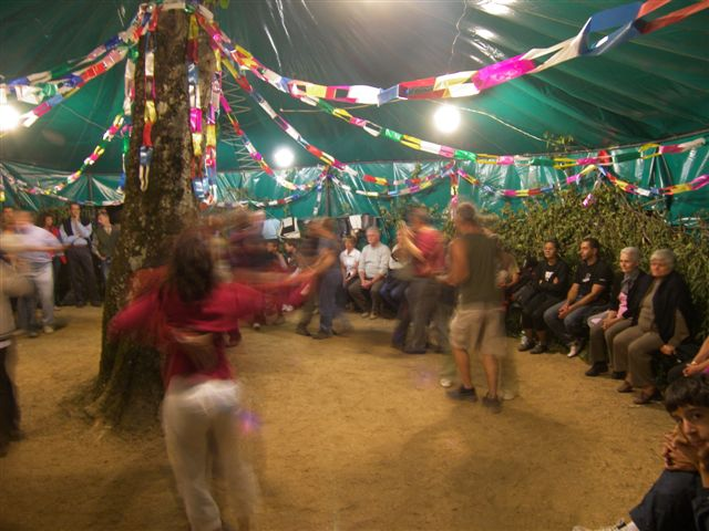 Foto mia personale, festa nella balera di Pizzonero (val Boreca) 20 agosto 2008 Licensing Categoria:Immagini di danza Categoria:Immagini delle quattro province